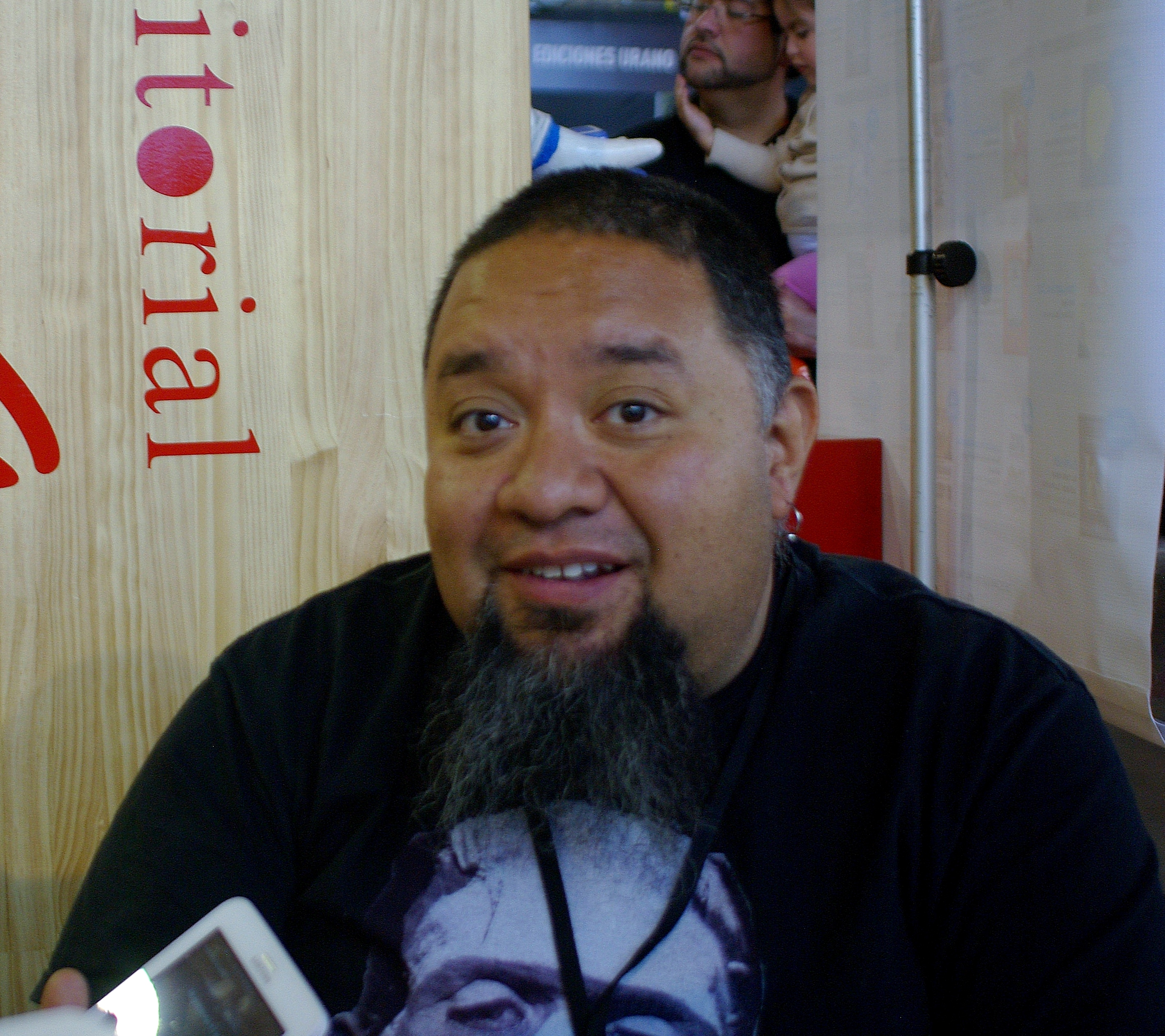 El historietista y escritor mexicano Bernardo Fernández, Bef, en la Feria Internacional del Libro de Santiago 2015